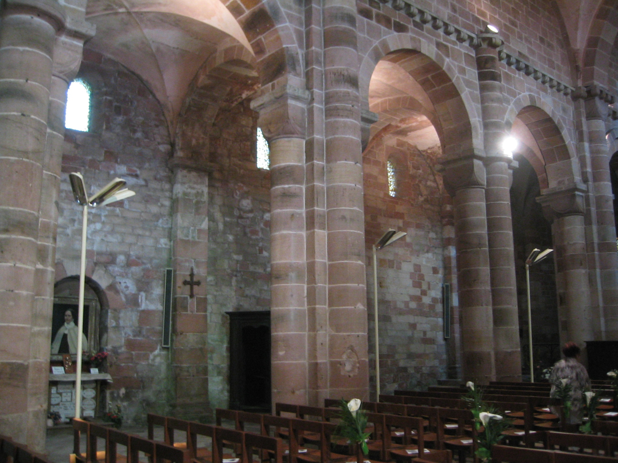 Nef romane de l'église Notre-Dame de Galilée (Saint-Dié-des-Vosges)